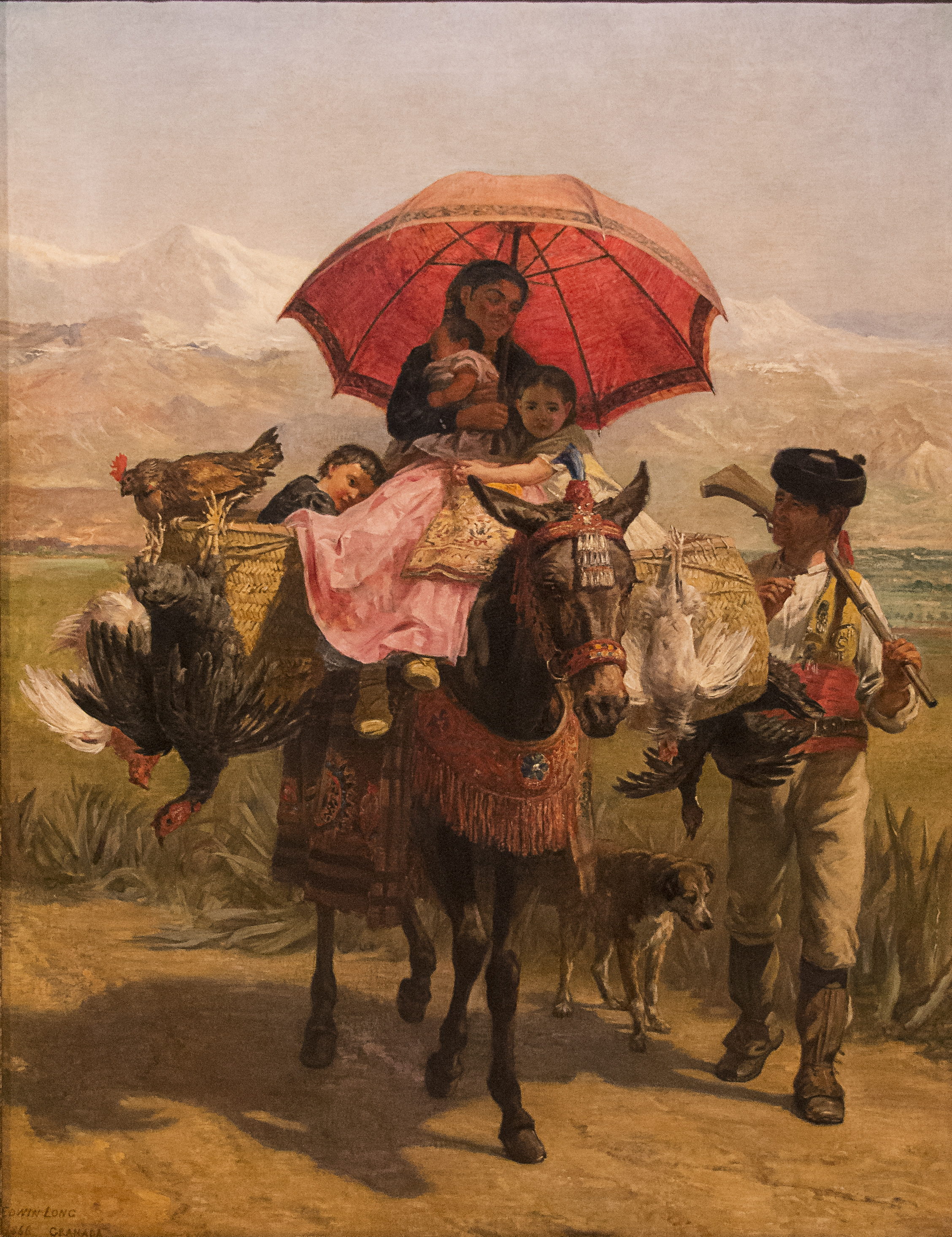 De camino, Granada. Óleo sobre lienzo 123 x 95 cm